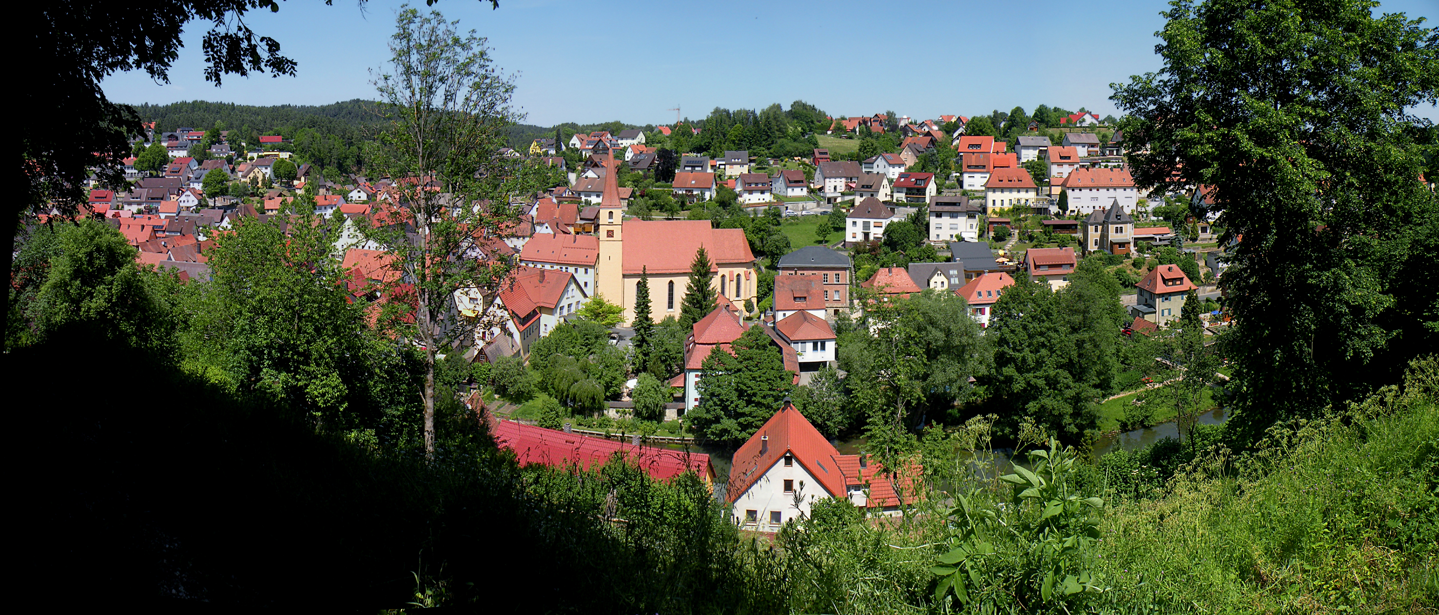 Общий вид города с Панорамной тропы